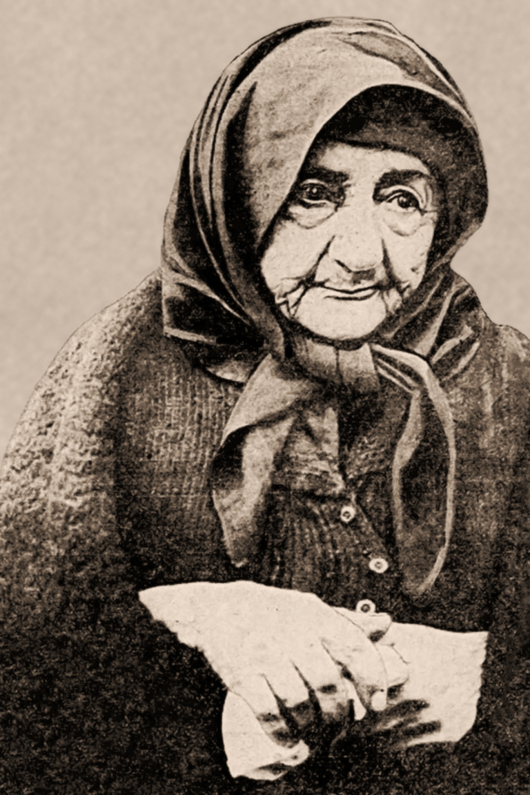 Baba Anujka (Anujka de Poshtonja) photo